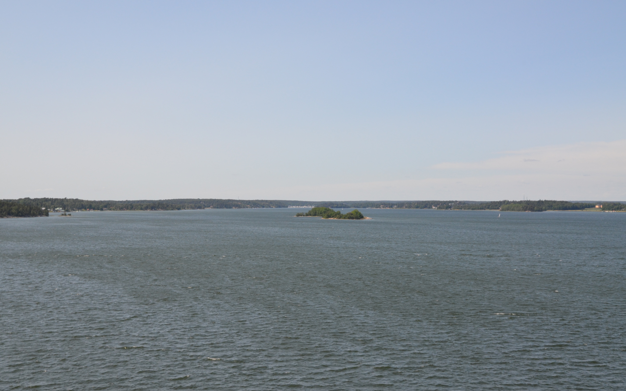 Trälhavet med Trälhavsgrunden i mitten och bortom dem marinan i Svinninge. Till höger skymtar Margretelunds slott.